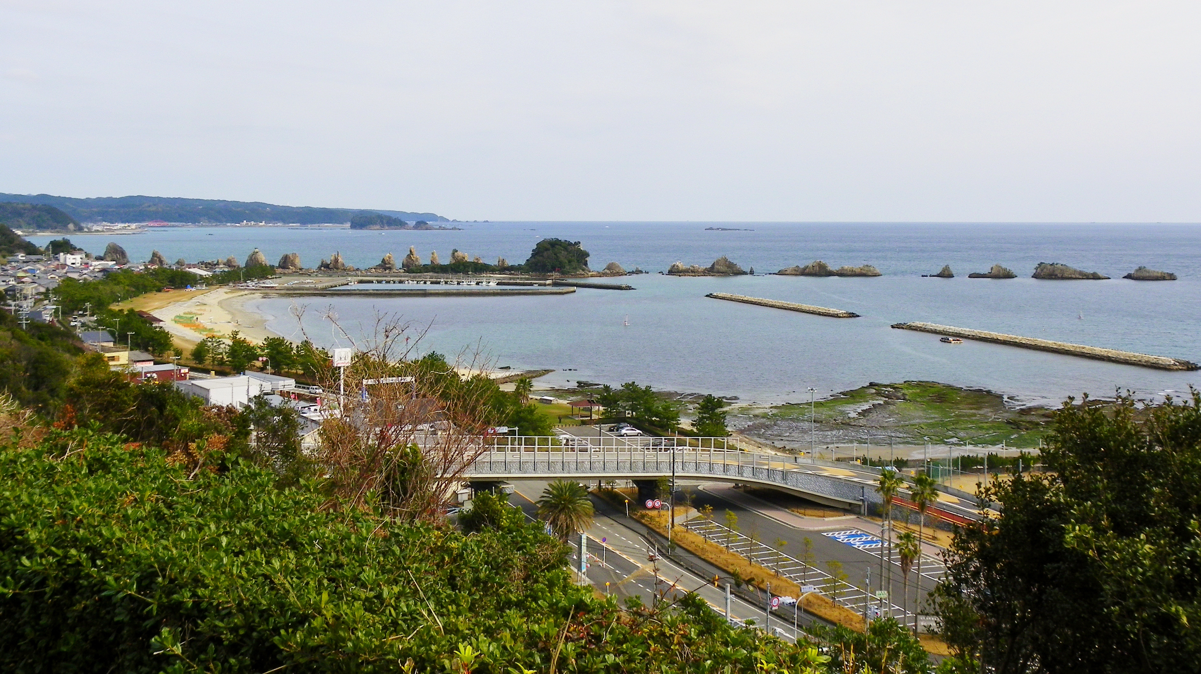 和歌山県串本町の橋杭岩の俯瞰全景（南紀串本ロイヤルホテルにて）。中文（台灣）: 日本和歌山縣串本町的橋杭岩俯瞰全景，攝於南紀串本Royal Hotel。